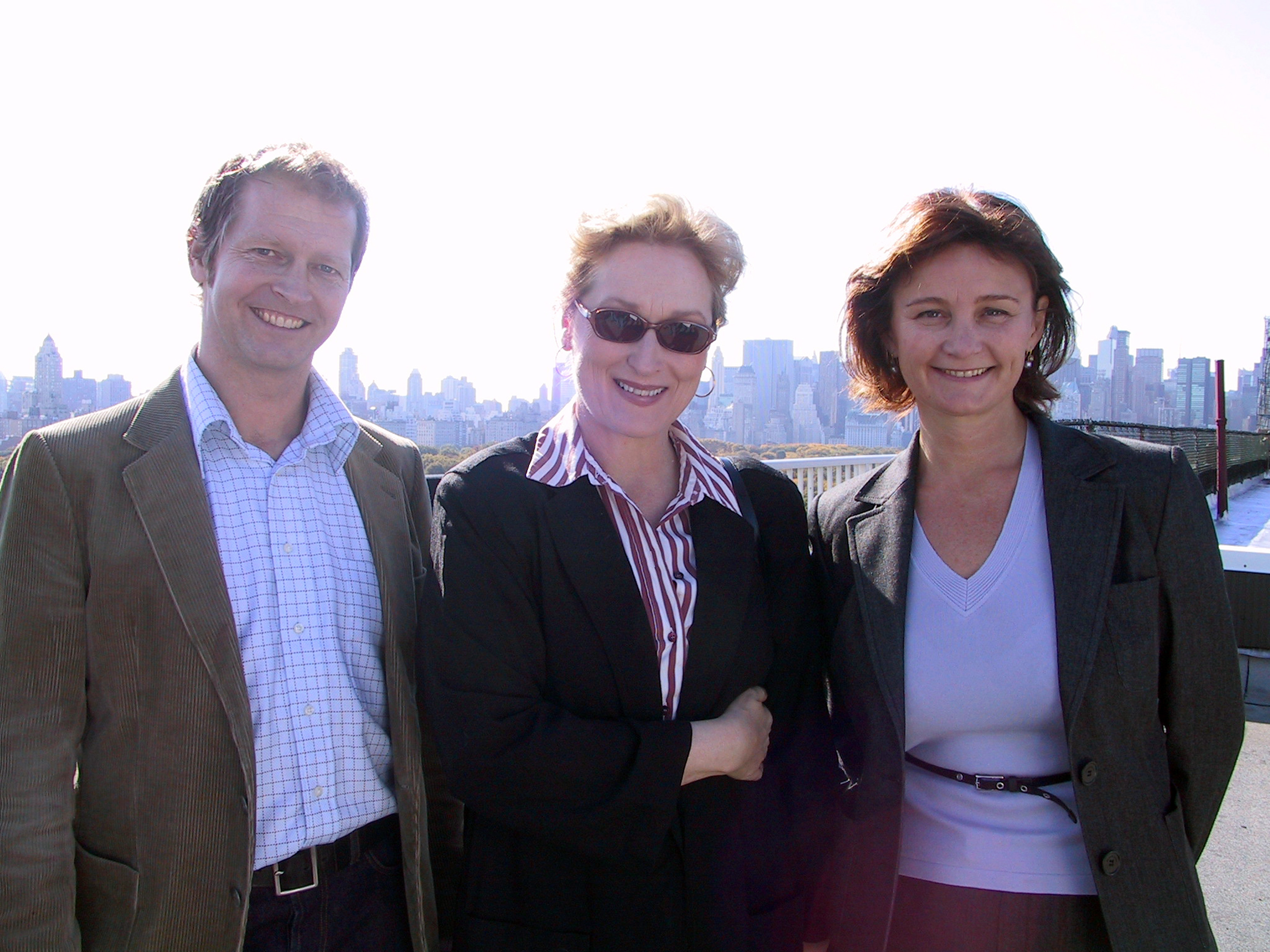 Meryl Streep with directors Marcus Mandal and Anna von Lowzow. Filming in New York for "Karen Blixen - Out of this world".